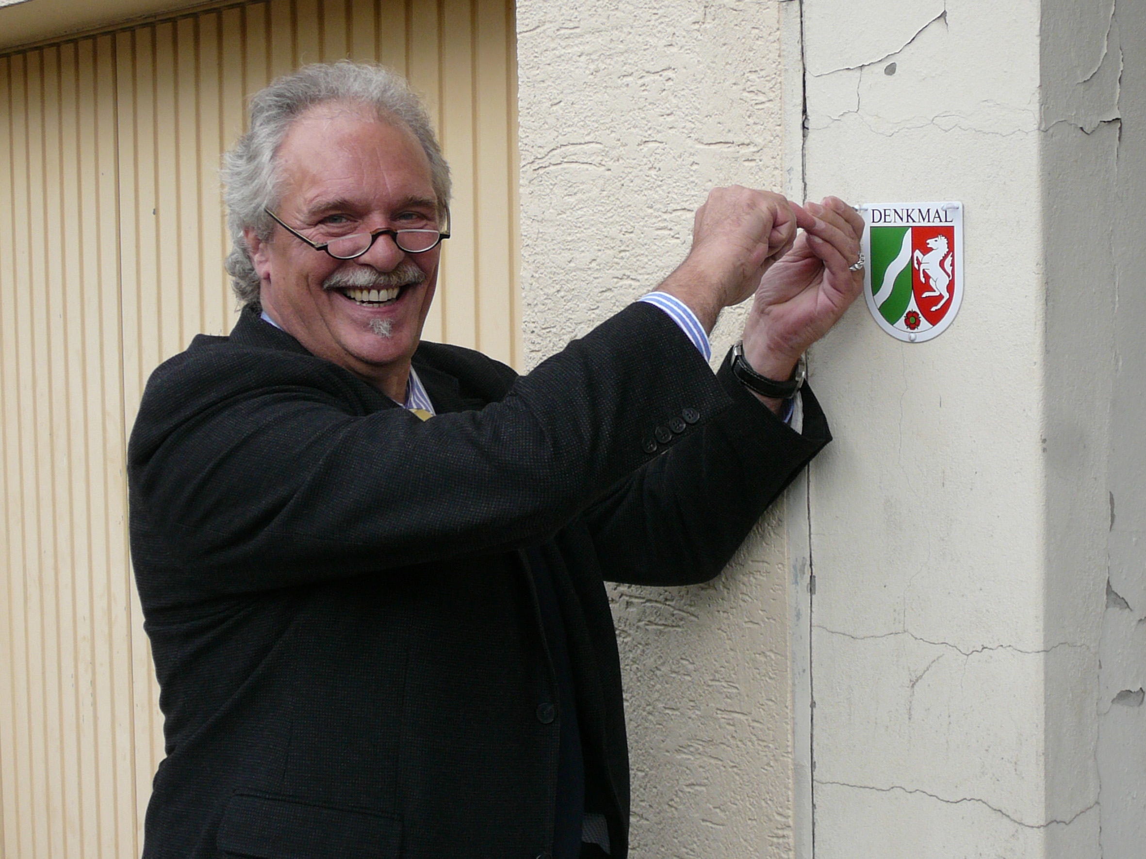 Ralph Schürmann schraubt das Denkmalschild an die Bielefelder Radrennbahn